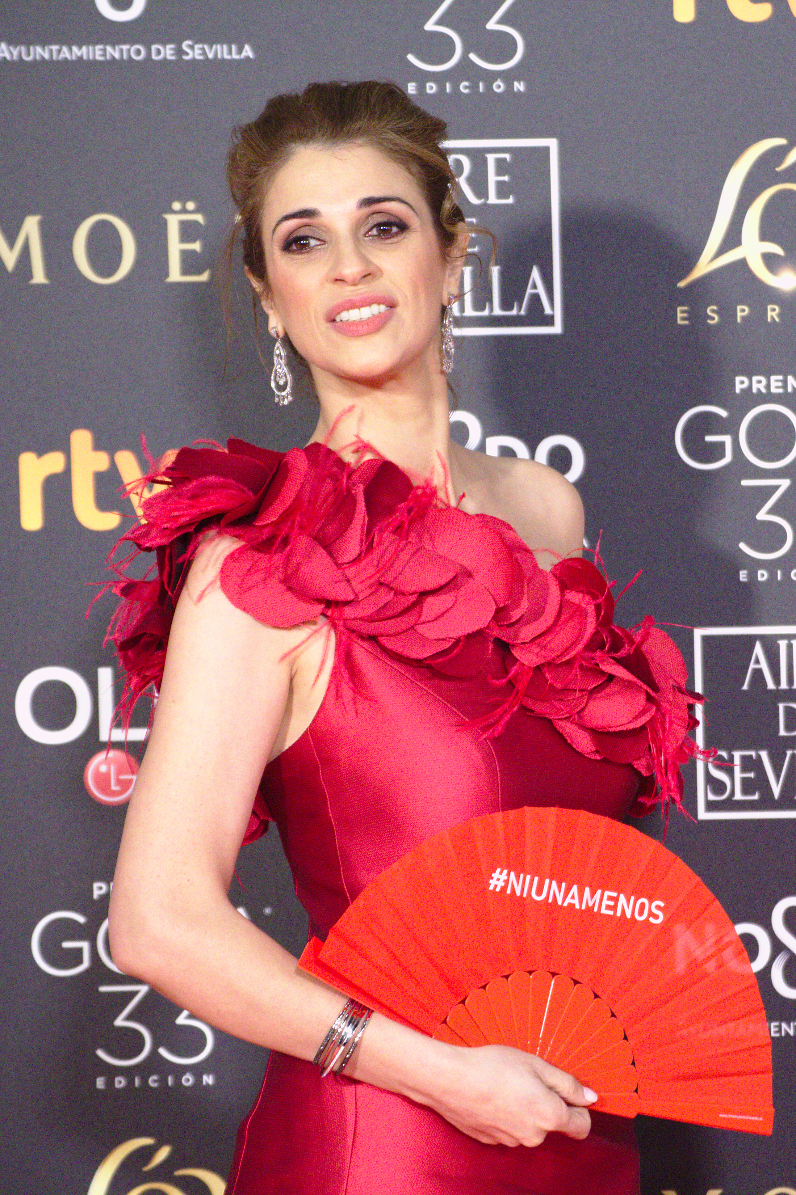 Ruth Gabriel en la alfombra roja de los Premios Goya celebrados en Sevilla en Febrero 2019